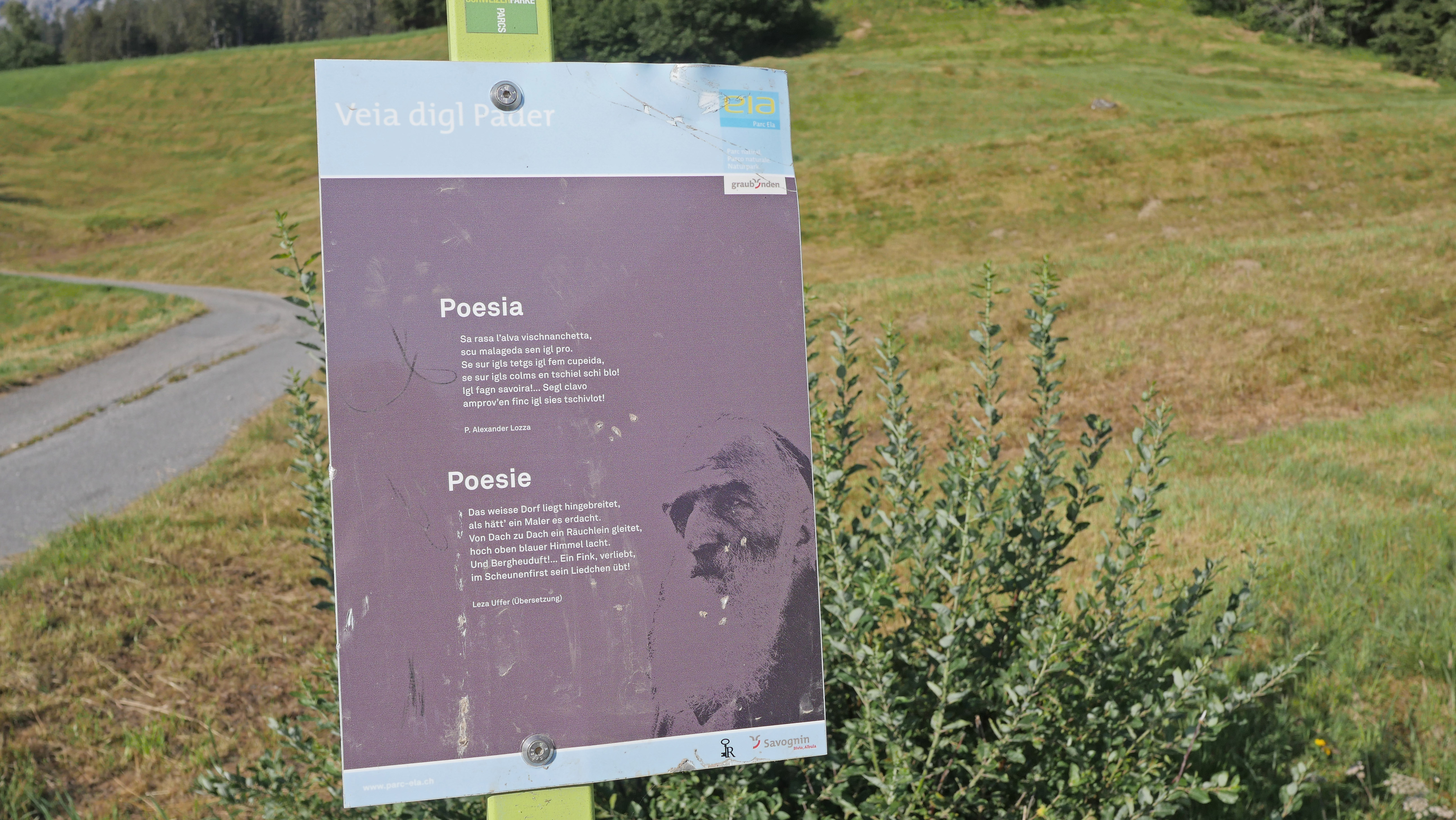 Veia digl Pader - Gedicht von Alexander Lozza (1880 - 1953) in Mon GR. Die Veia digl Pader ist ein Poesieweg, die dem Bündner Dichter gewidmet ist. Der Weg geht von Savognin nach Stierva und hat total 13 Stationen.